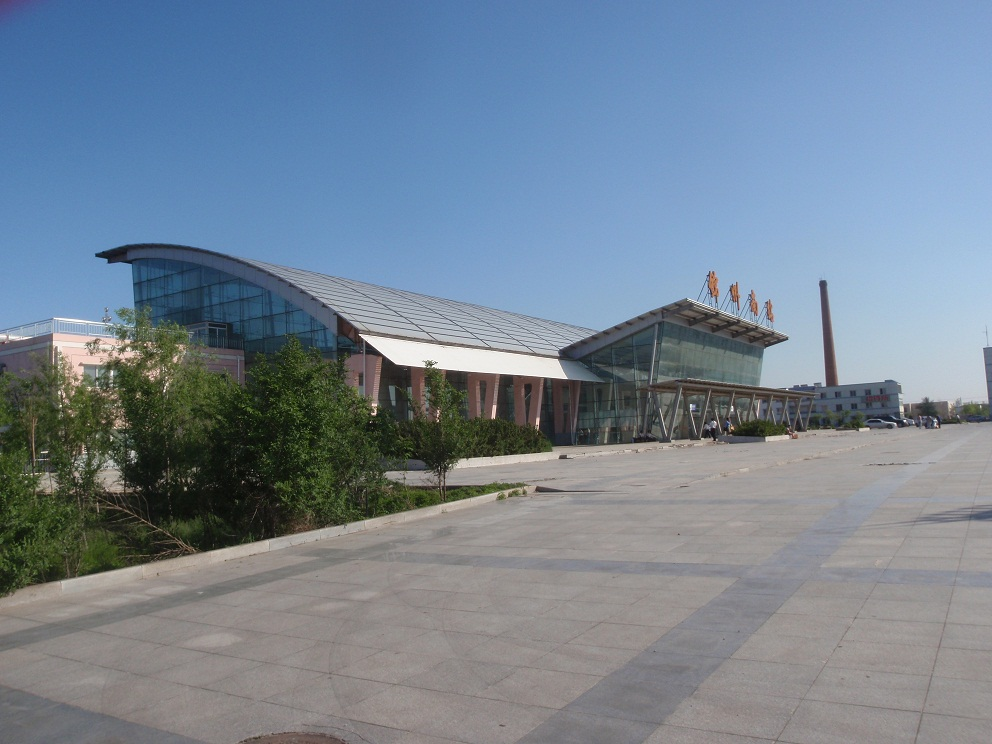 錦州南駅 (きんしゅう-) 。中華人民共和国、遼寧省、錦州市にある鉄道駅。現在は京哈線の一部になっている高速新線「秦瀋客運専線」の途中駅。